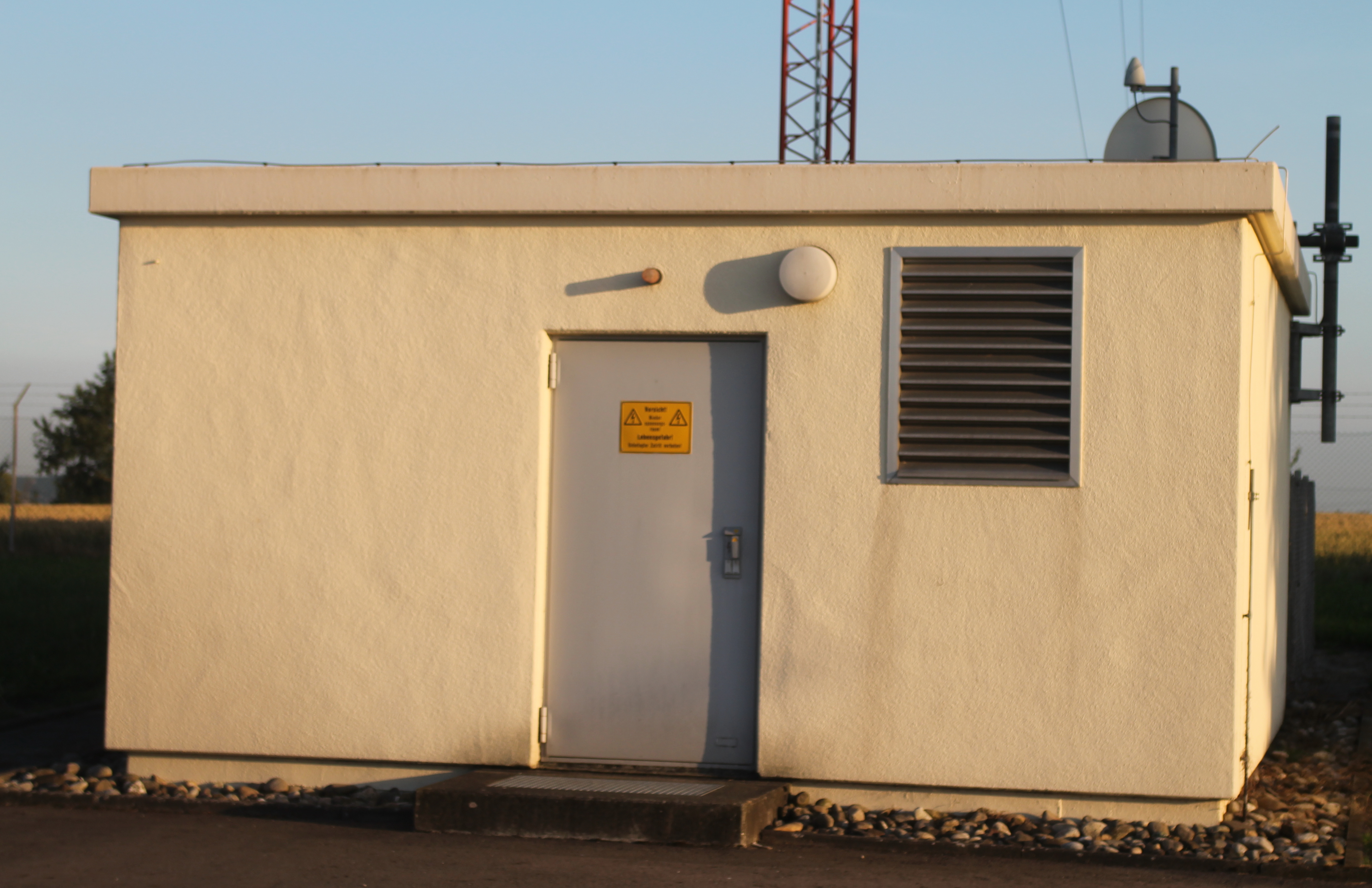 Sendergebäude Obereisesheim - OpenStreetMap(Info)